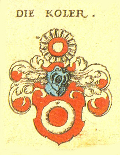 Wappen der Nürnberger Patrizierfamilie Koler von Neunhof